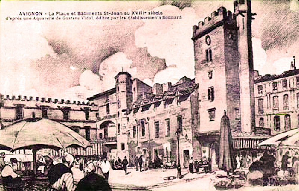 La commanderie de Saint-Jean le Vieux et le marché de la place Pie au XVIIIe s